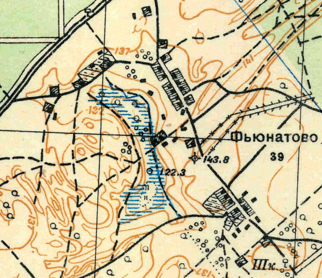 Топографическая карта Ленинградской области, квадрат О-35-24-А-г (Горки), деревня Фьюнатово